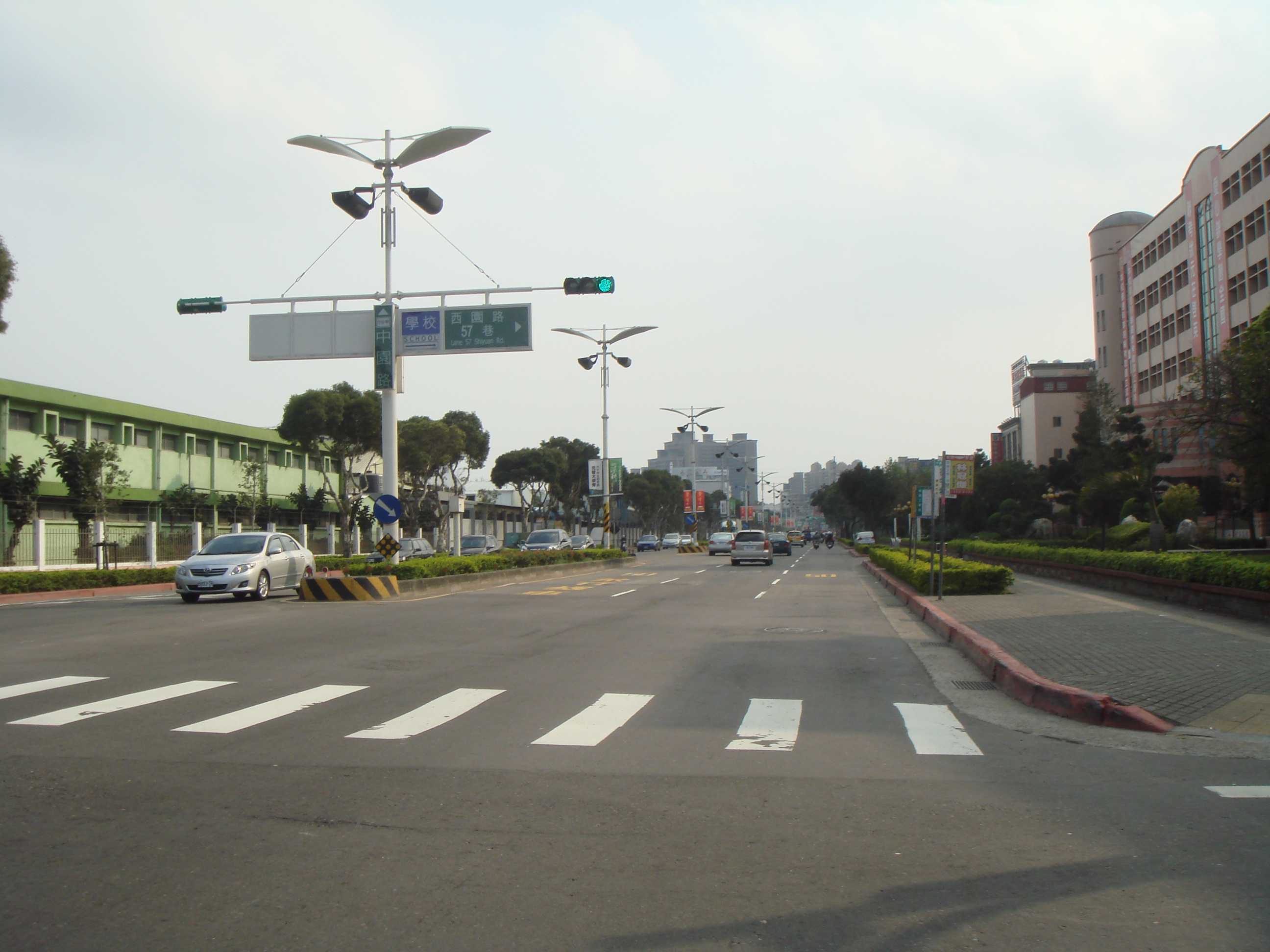 中園路，啟英高中附近.